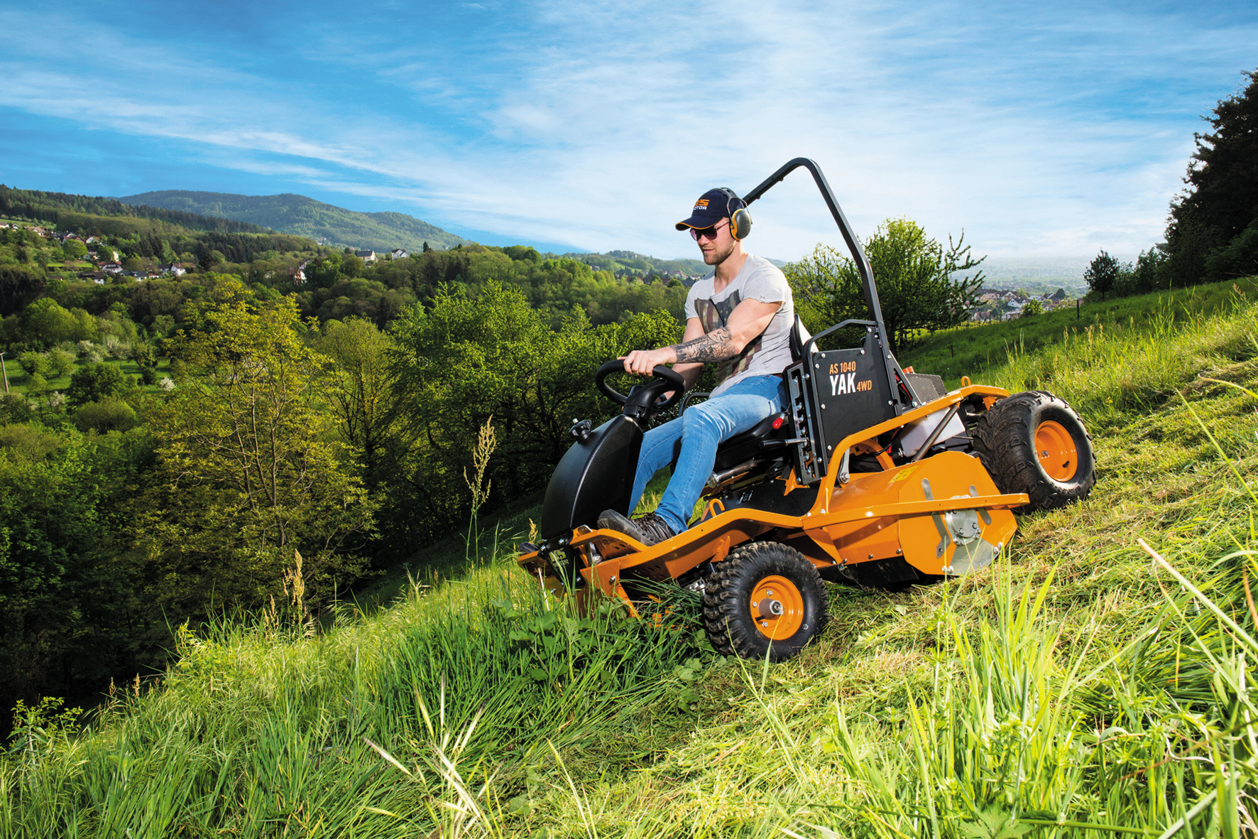 Aufsitz-Schlegelmäher AS 1040 Yak 4WD von AS-Motor ist für den Einsatz in unebenen, rauen und steilen Geländen gemacht. Tags: Aufsitz-Schlegelmäher, Aufsitzmäher